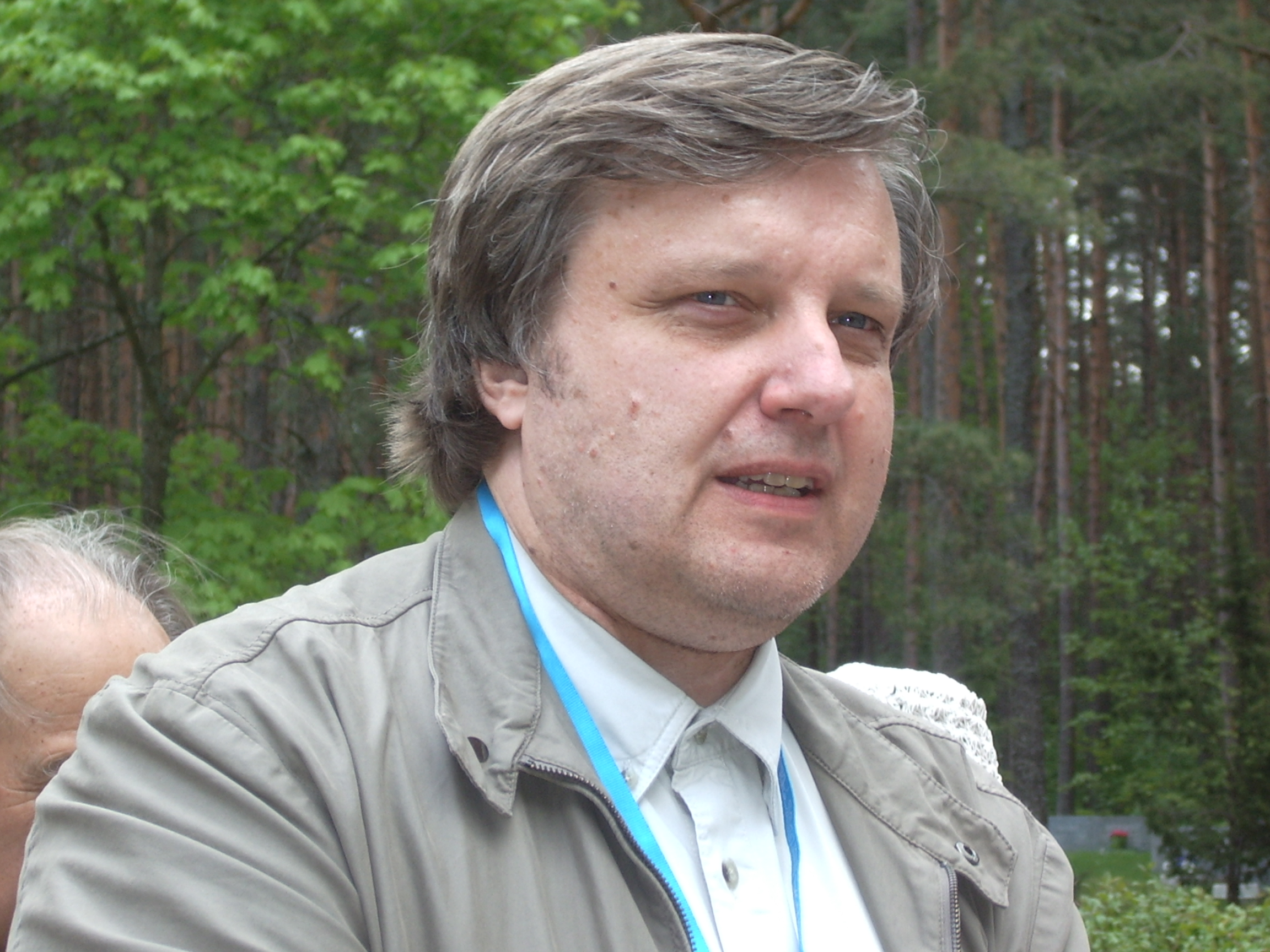 Toomas Haug läbi viimas kirjanduslikku retke Metsakalmistul kirjandusfestivali HeadRead raames